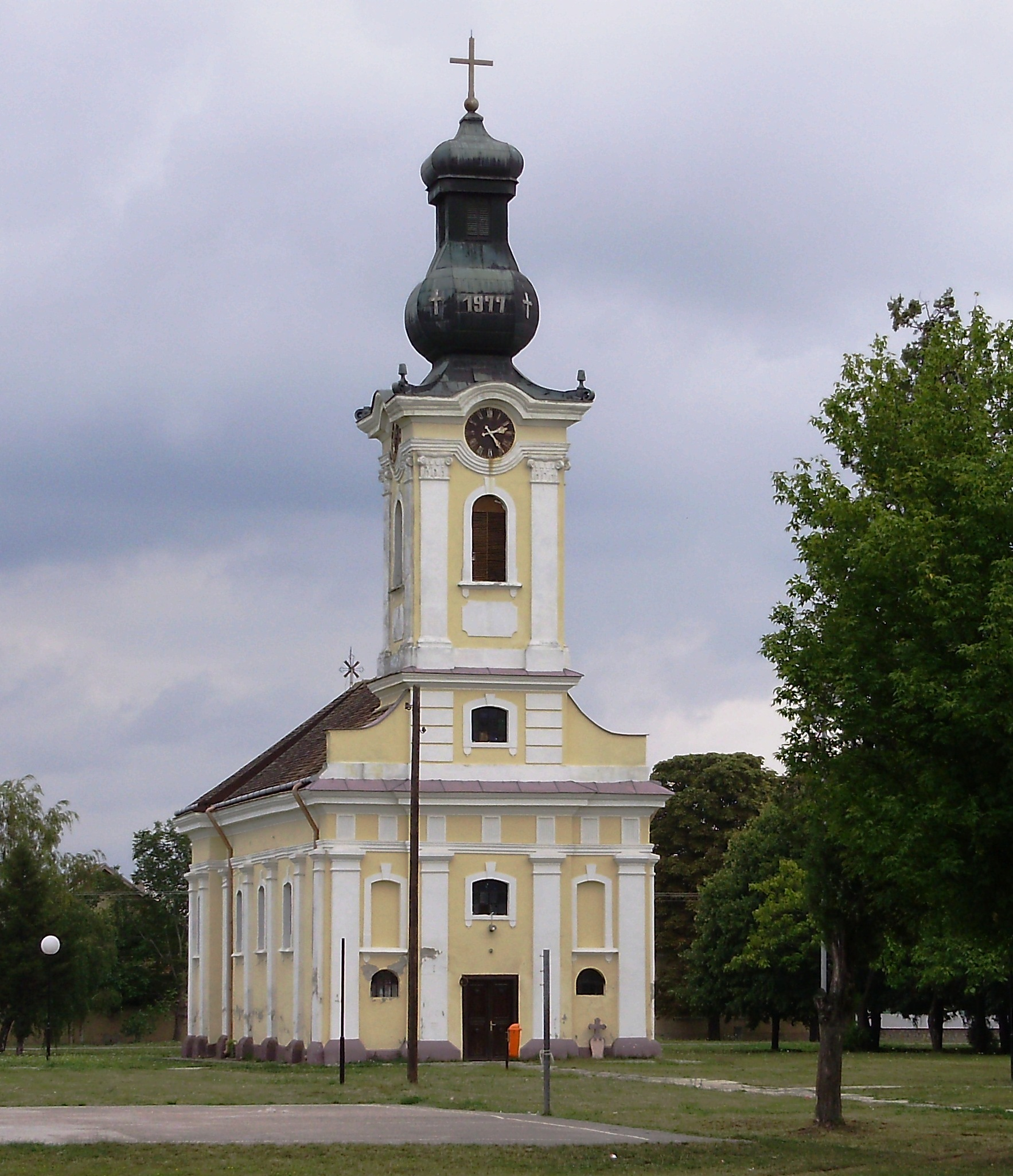 Crkva u Barandi